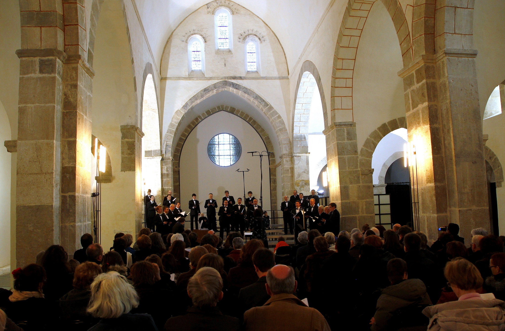 Bonmont